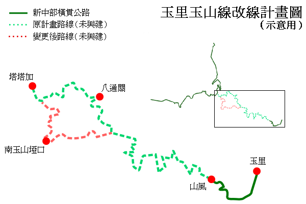 玉里玉山線改線示意圖。